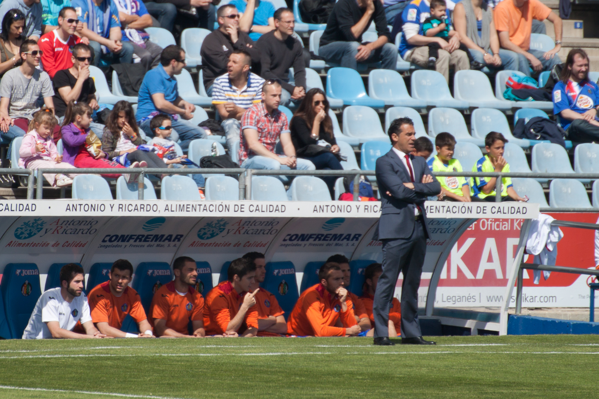 Luis García Plaza (Madrid, España, 1 de diciembre de 1972) es un ex futbolista y entrenador español. Partido celebrado el 21-04-2013 entre el Getafe C.F. - R.C.D. Español correspondiente a La Liga.